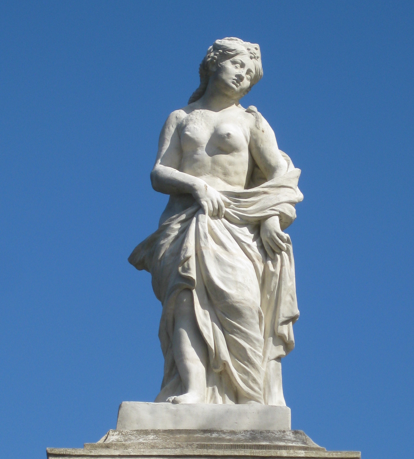 Het Lot, sculptuur van Rombert Verhulst, op de bakstenen pijlers van de toegangspoort van de voormalige buitenplaats "Zwaansvliet" 1660-1665. Via het Rijksmuseum in Amsterdam sinds december 2012 weer herplaatst op de oude locatie Volgerweg 83, Zuidoost Beemster.